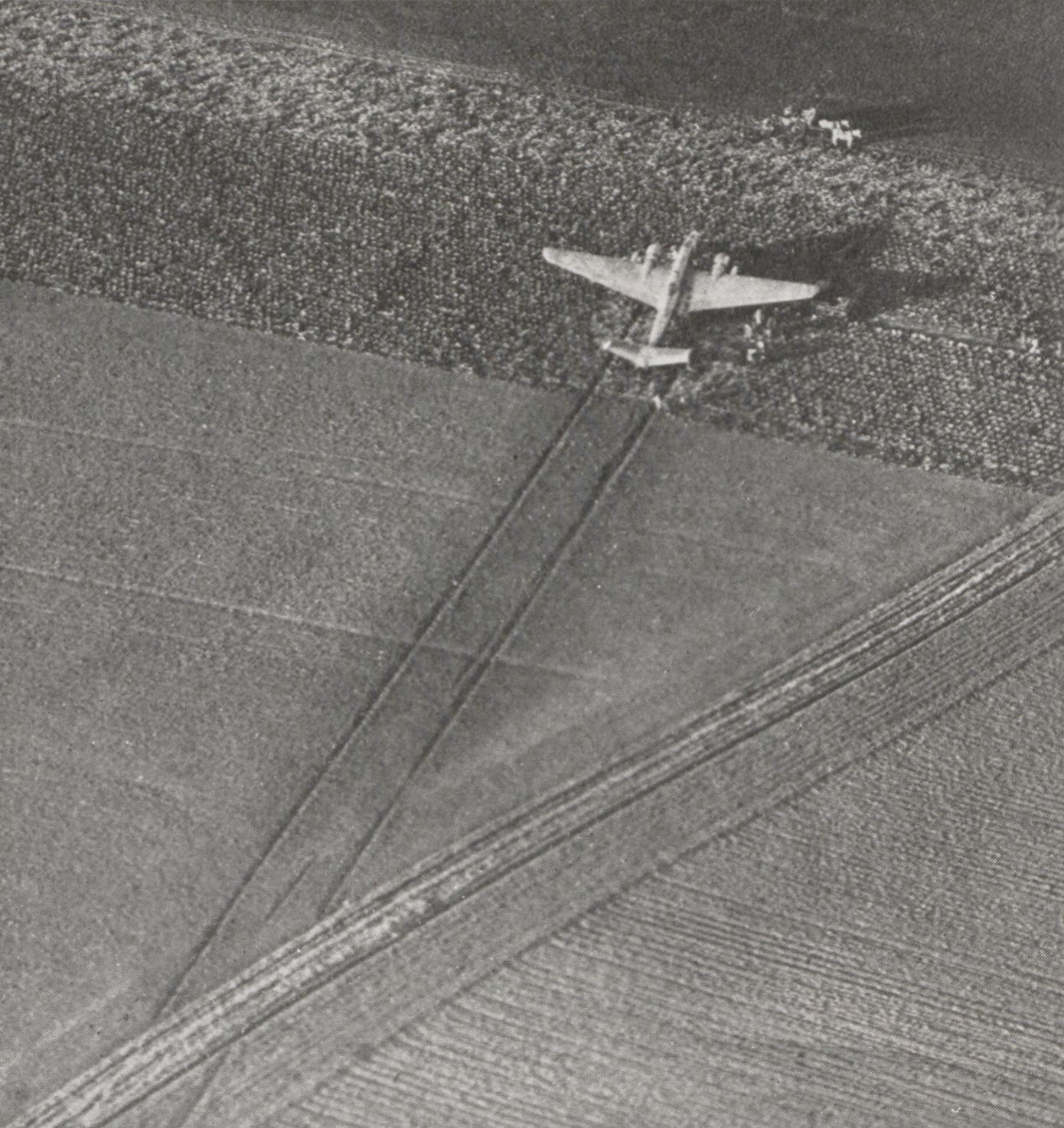 Atterrissage en campagne effectué par un LeO 45, sans aucun dommage (Saclay, 6 décembre 1937). Longueur de roulement, 150m.